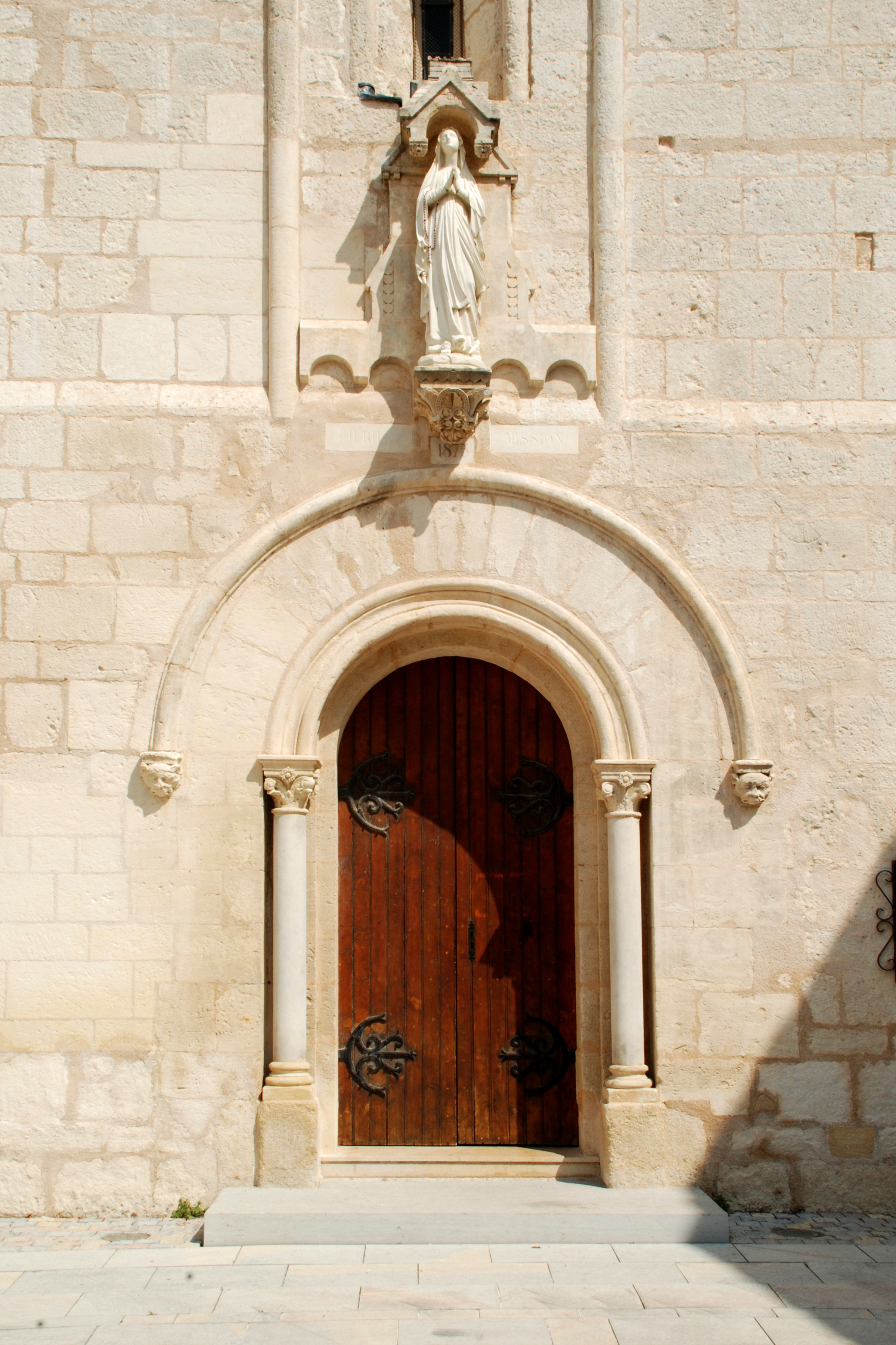 France - Languedoc - Hérault - Église Sainte-Agathe de Valergues